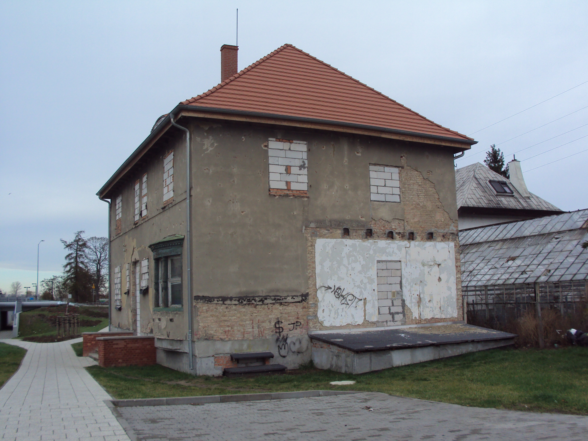 Willa Grünebergów w Szczecinie